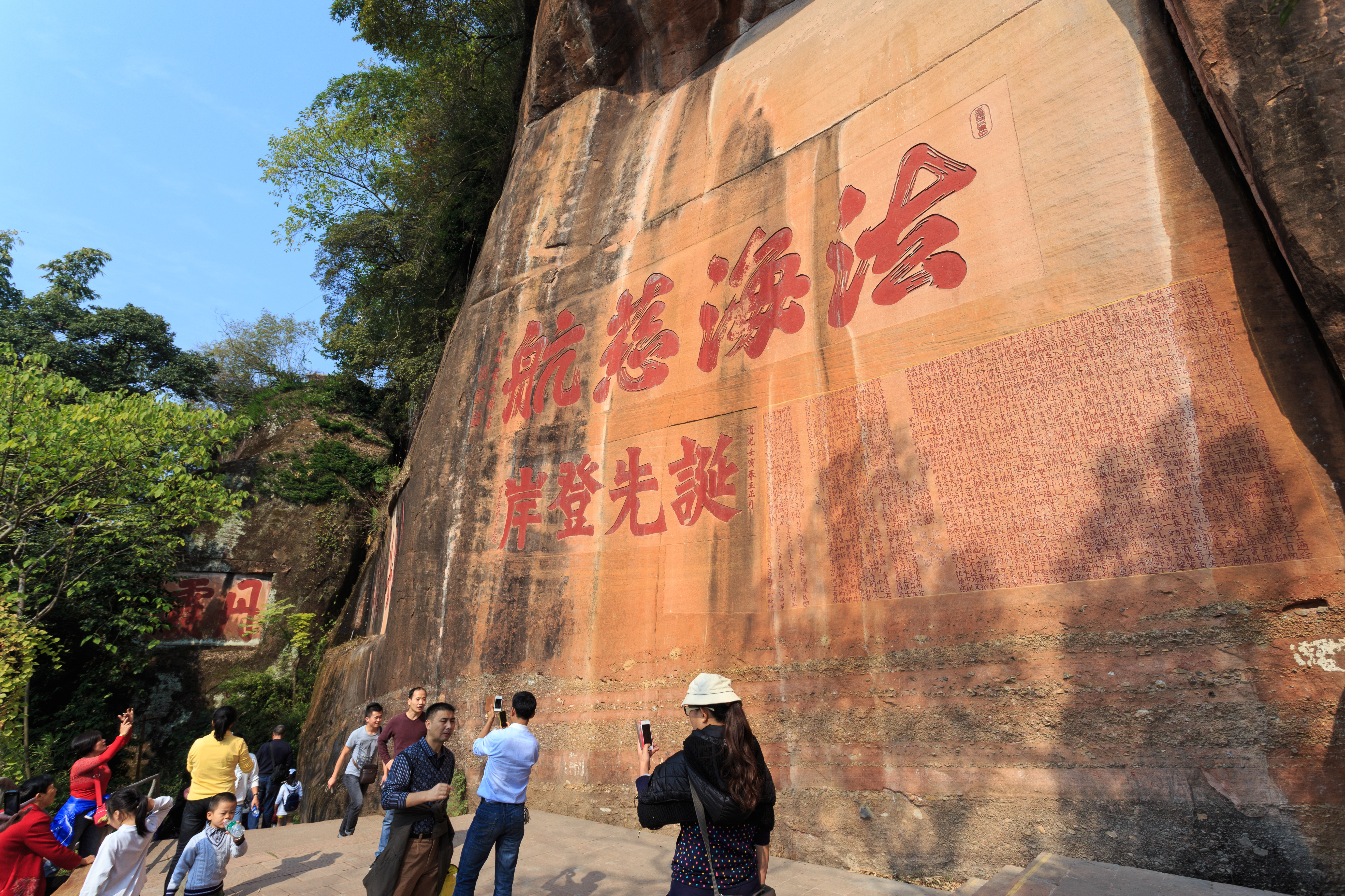 广东省仁化县丹霞山摩崖石刻—— 别传寺摩崖石刻群